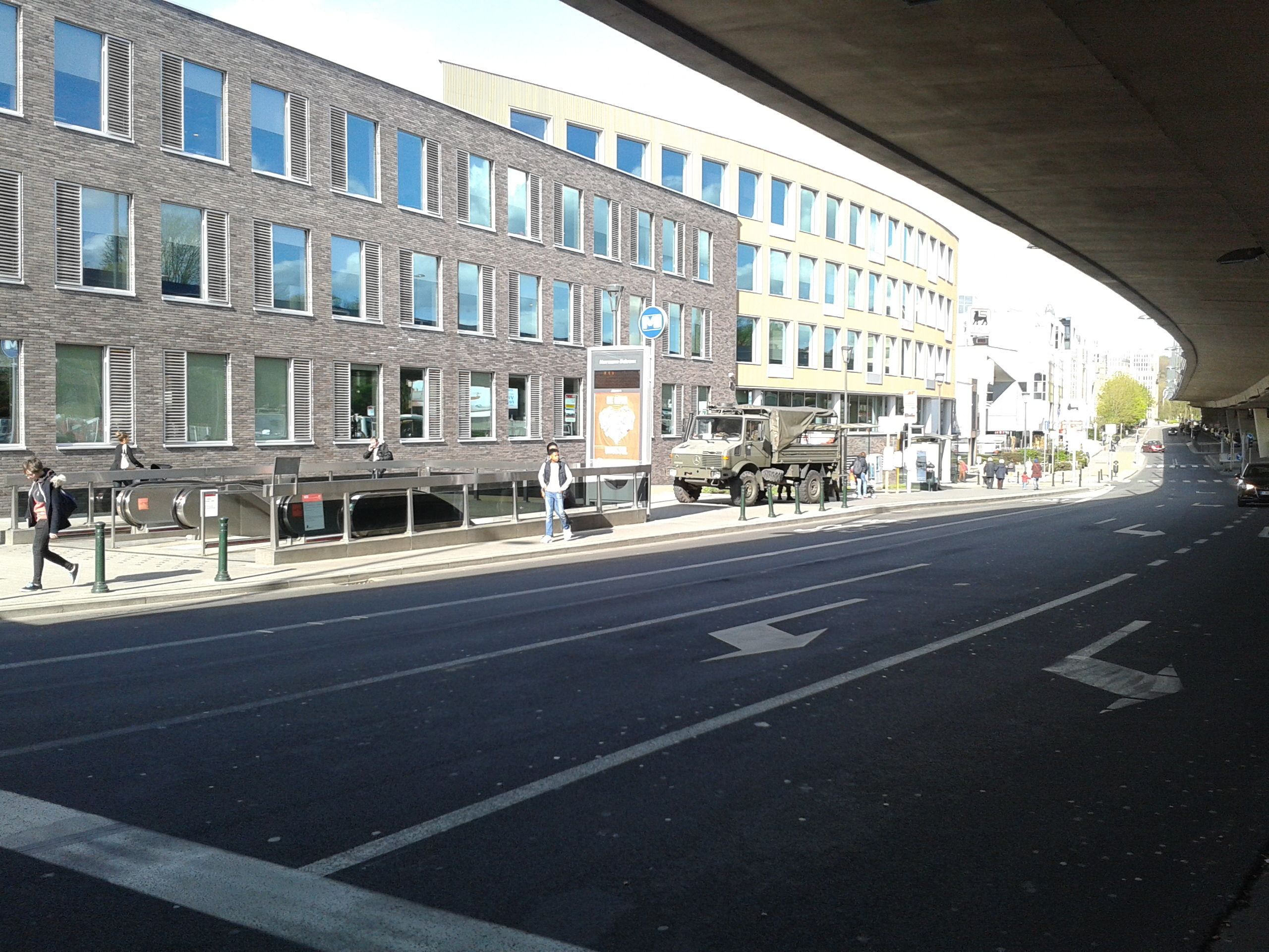 Présence militaire à l'entrée de la station de métro Herrmann-Debroux à Auderghem (Bruxelles).